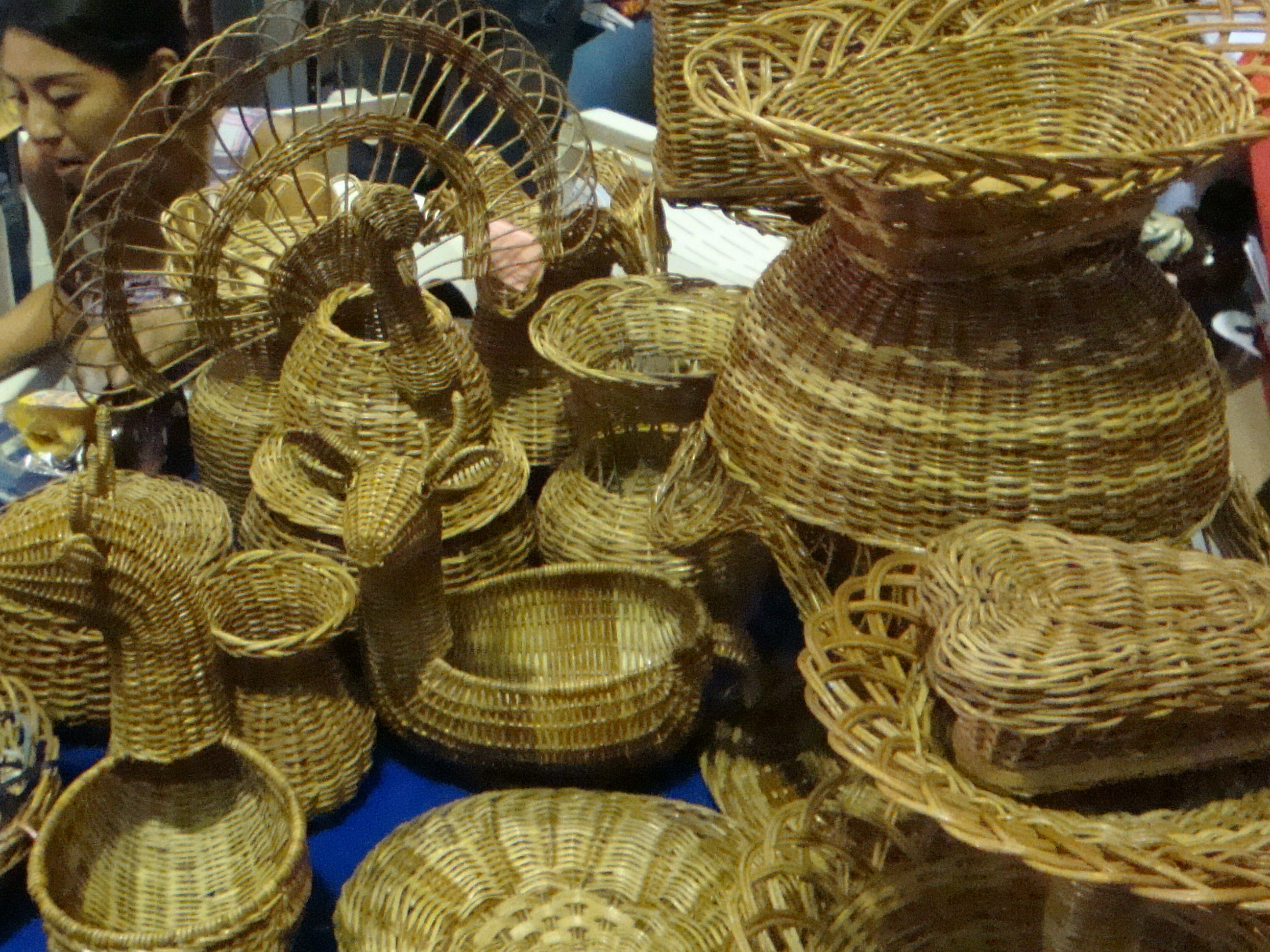 Artesanías hechas de mimbre, tipicas del municipio de Tacotalpa, Tabasco, México